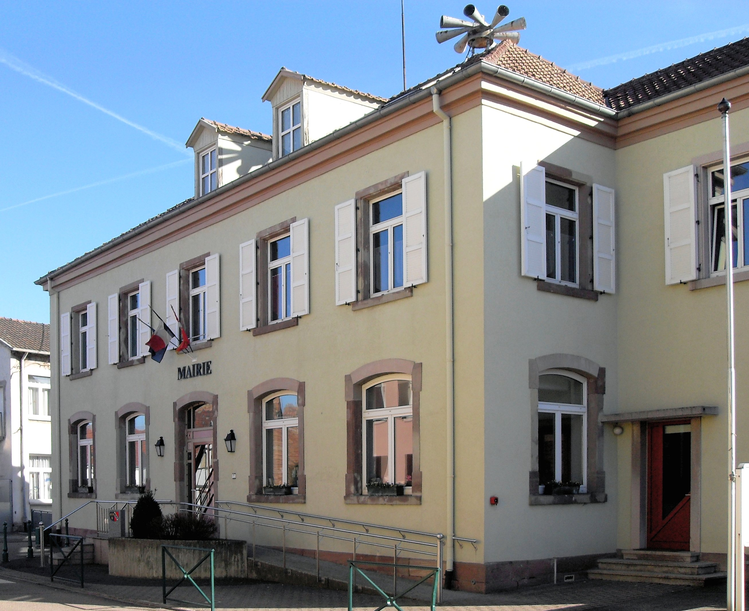 La mairie de Munchhouse